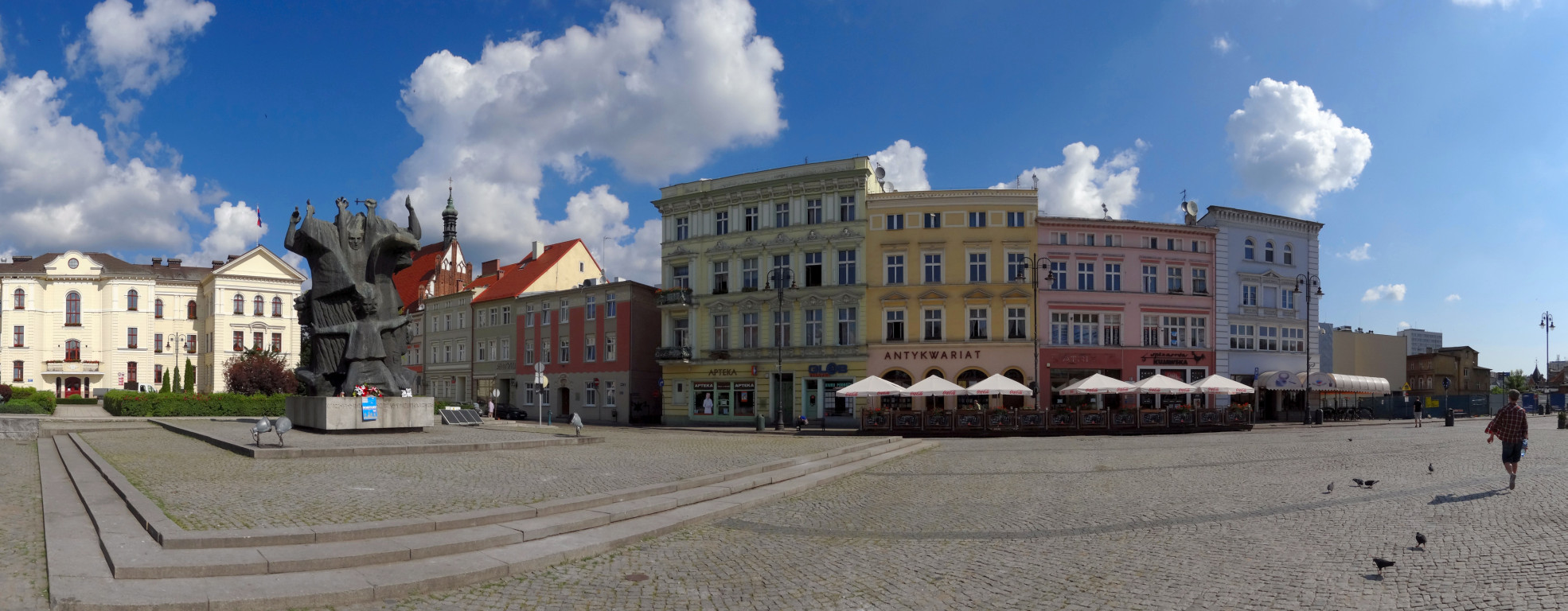 Stary Rynek w Bydgoszczy - zdjęcie panoramiczne